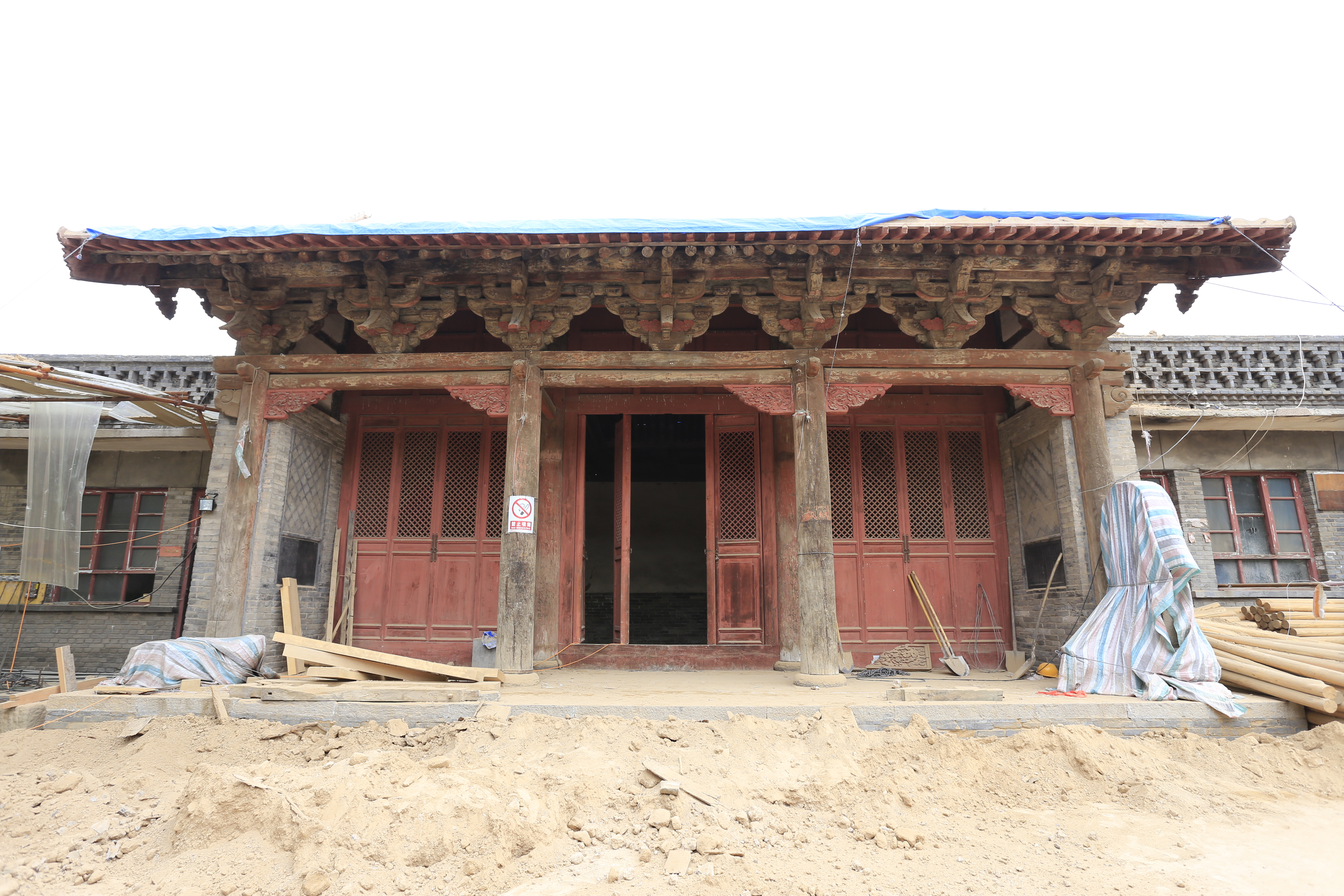 灵石静升后土庙 —— 正殿